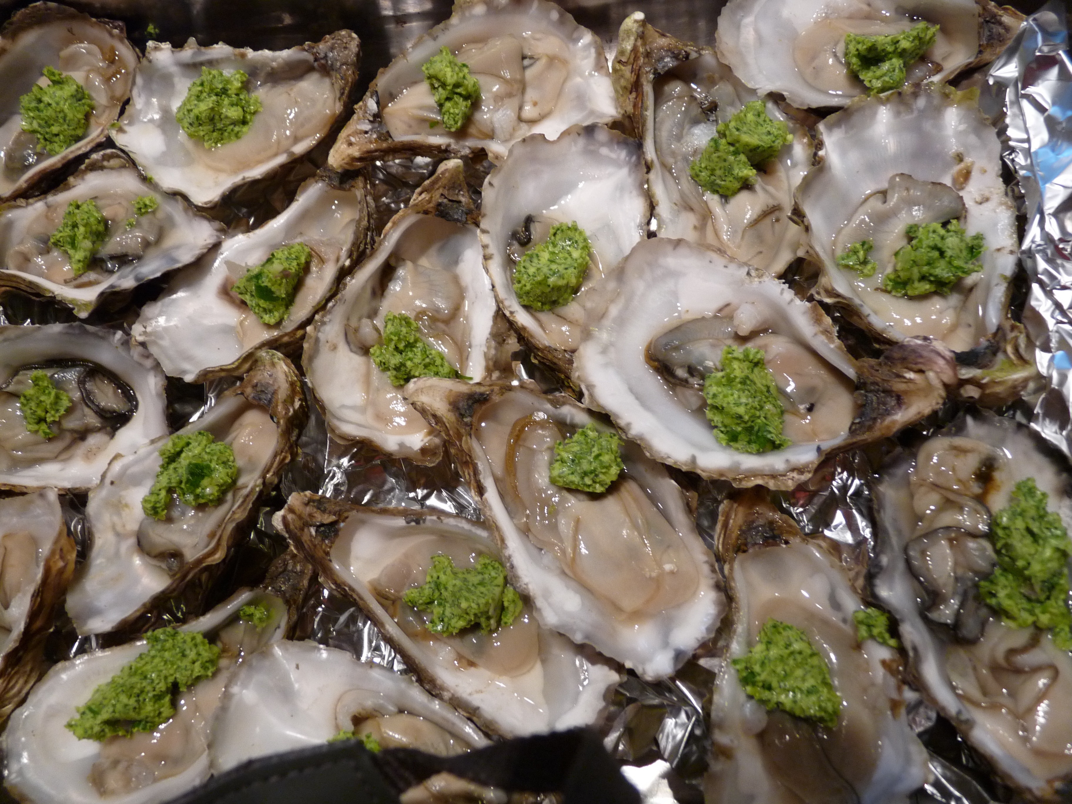 Oysters Persillade